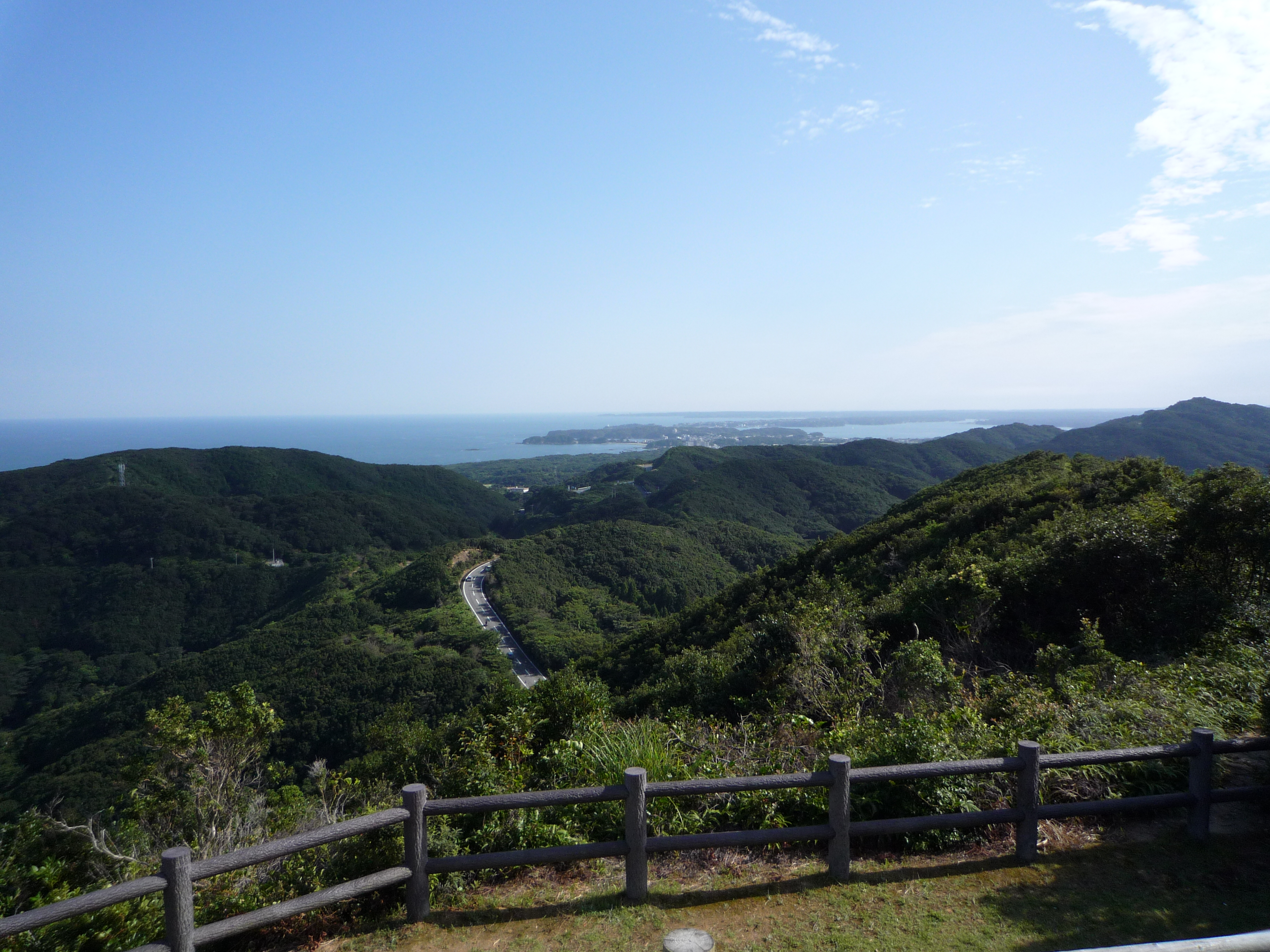 パールロードの鳥羽展望台より賢島方面を眺める。